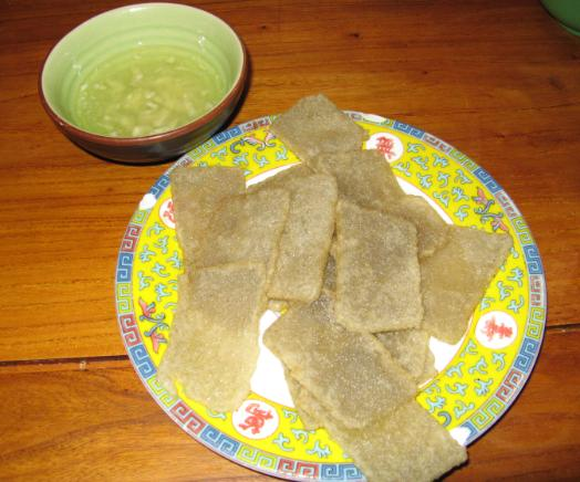 灌肠 拍摄于北京东四丰年灌肠店